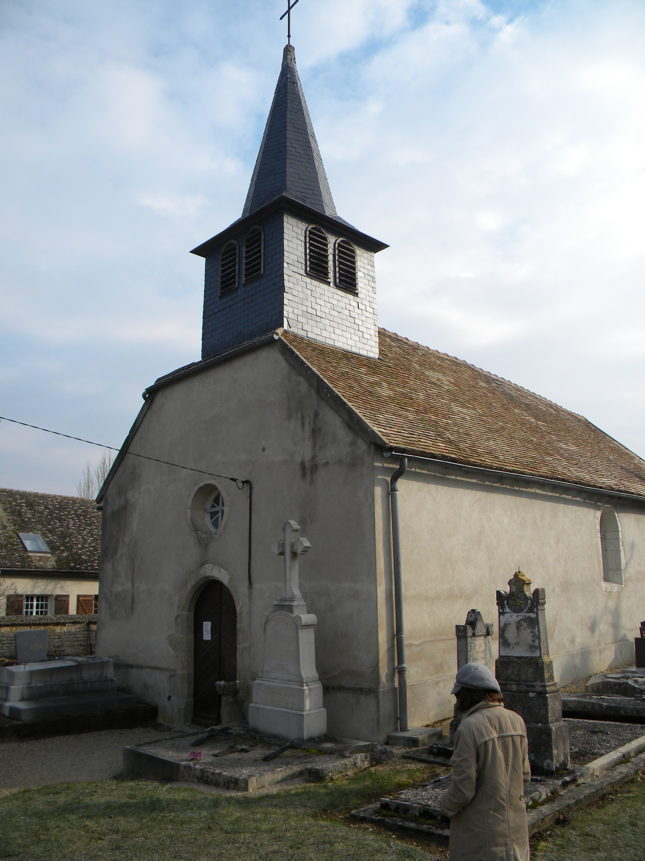 Kirko de Tailly